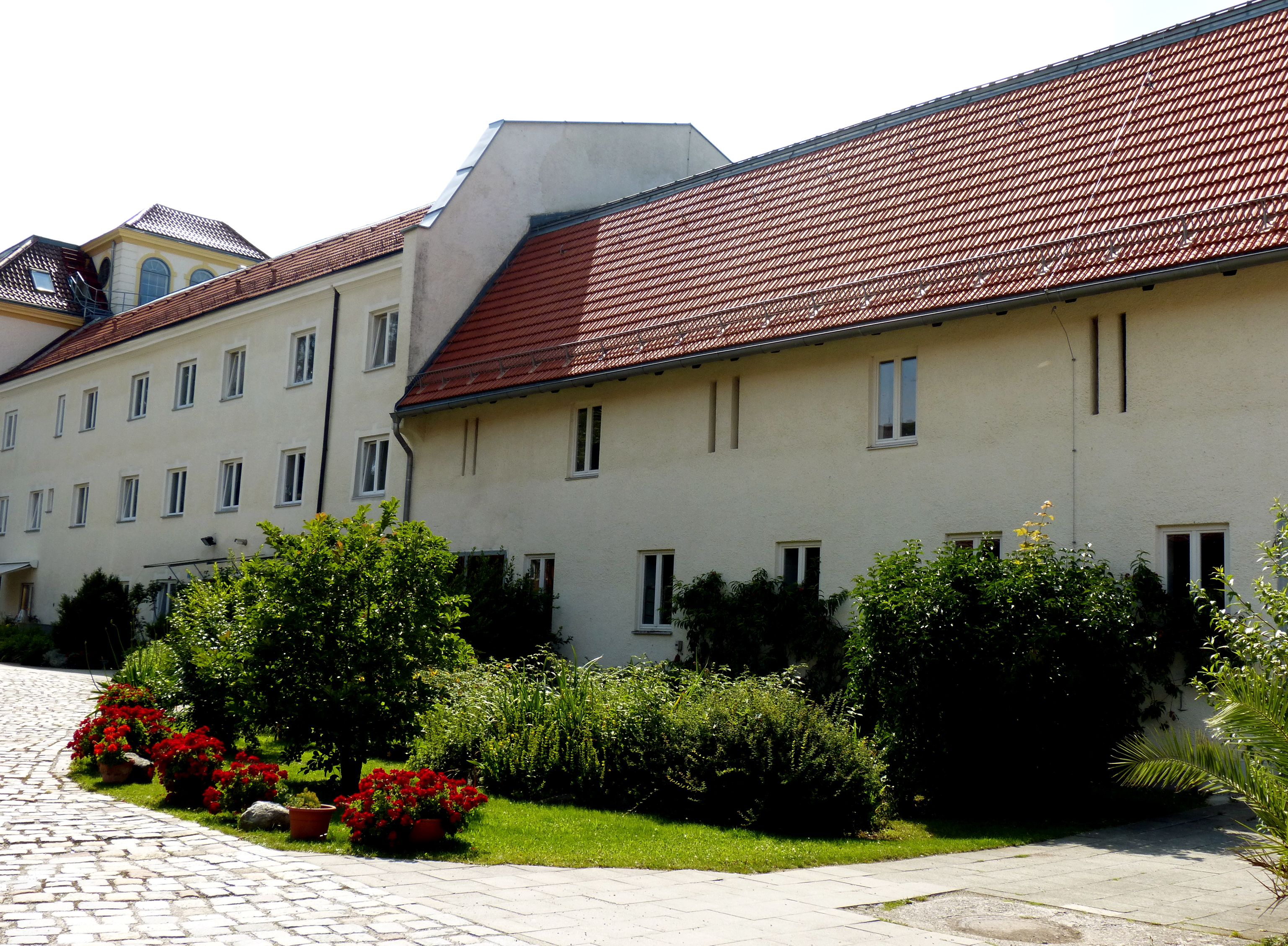 Starnberg, Gut Buchhof. Ein Teil des nördlich an das Schlossgebäude anschließenden Wohn- und Wirtschaftstraktes mit liebevoll gepflegten Grünzonen.